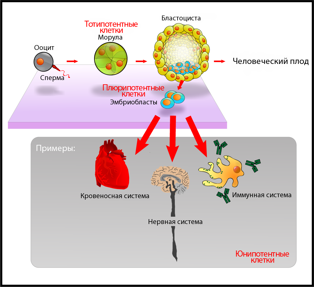 Иерархия стволовых клеток.